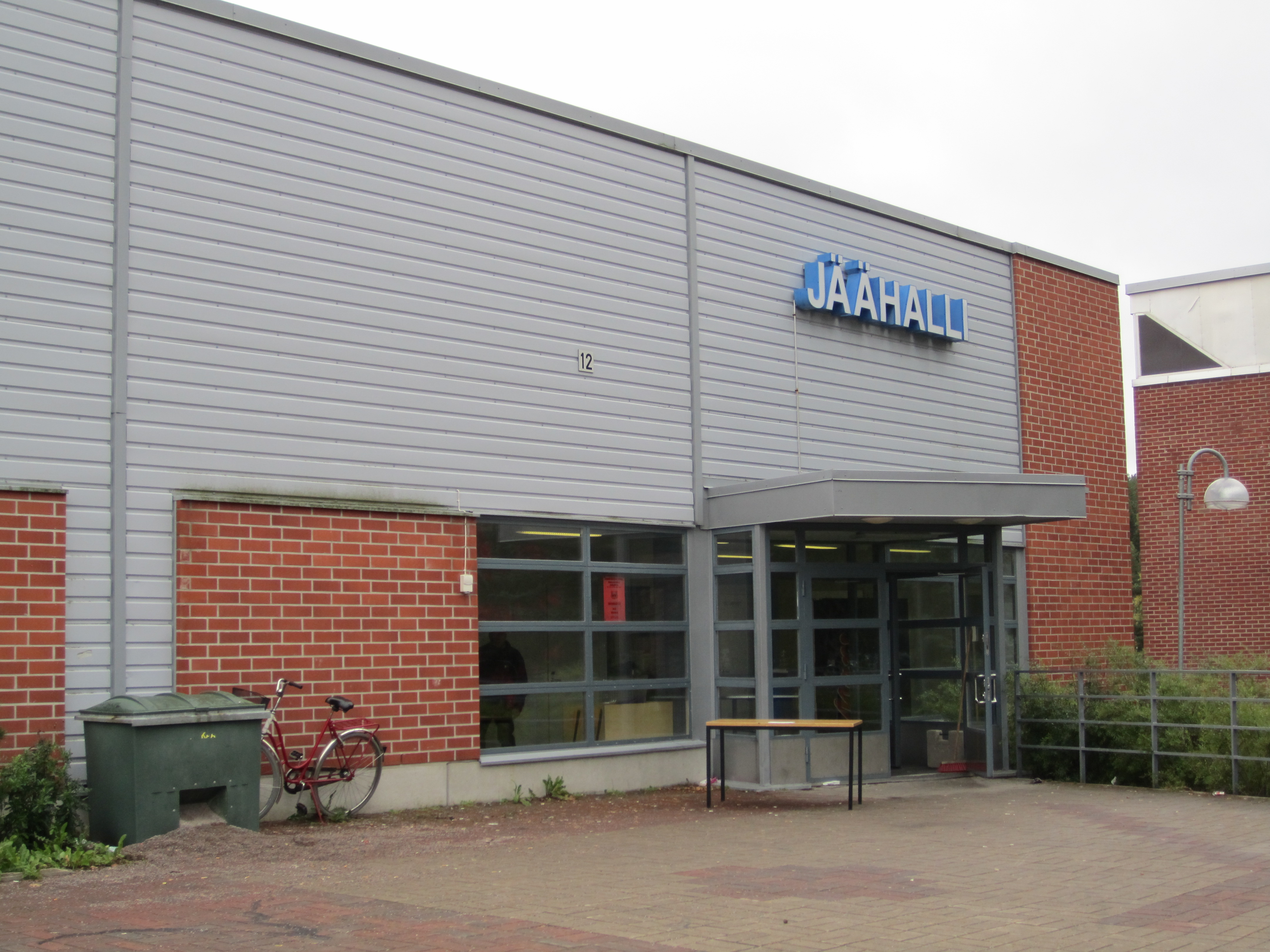 Kuusankosken jäähalli, Kouvola.